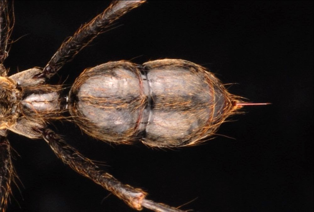 Dinoponera sp.